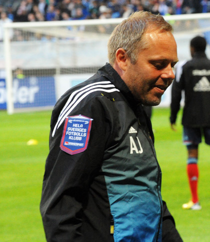 Djurgårdens IF Assistant Coach Anders Johansson